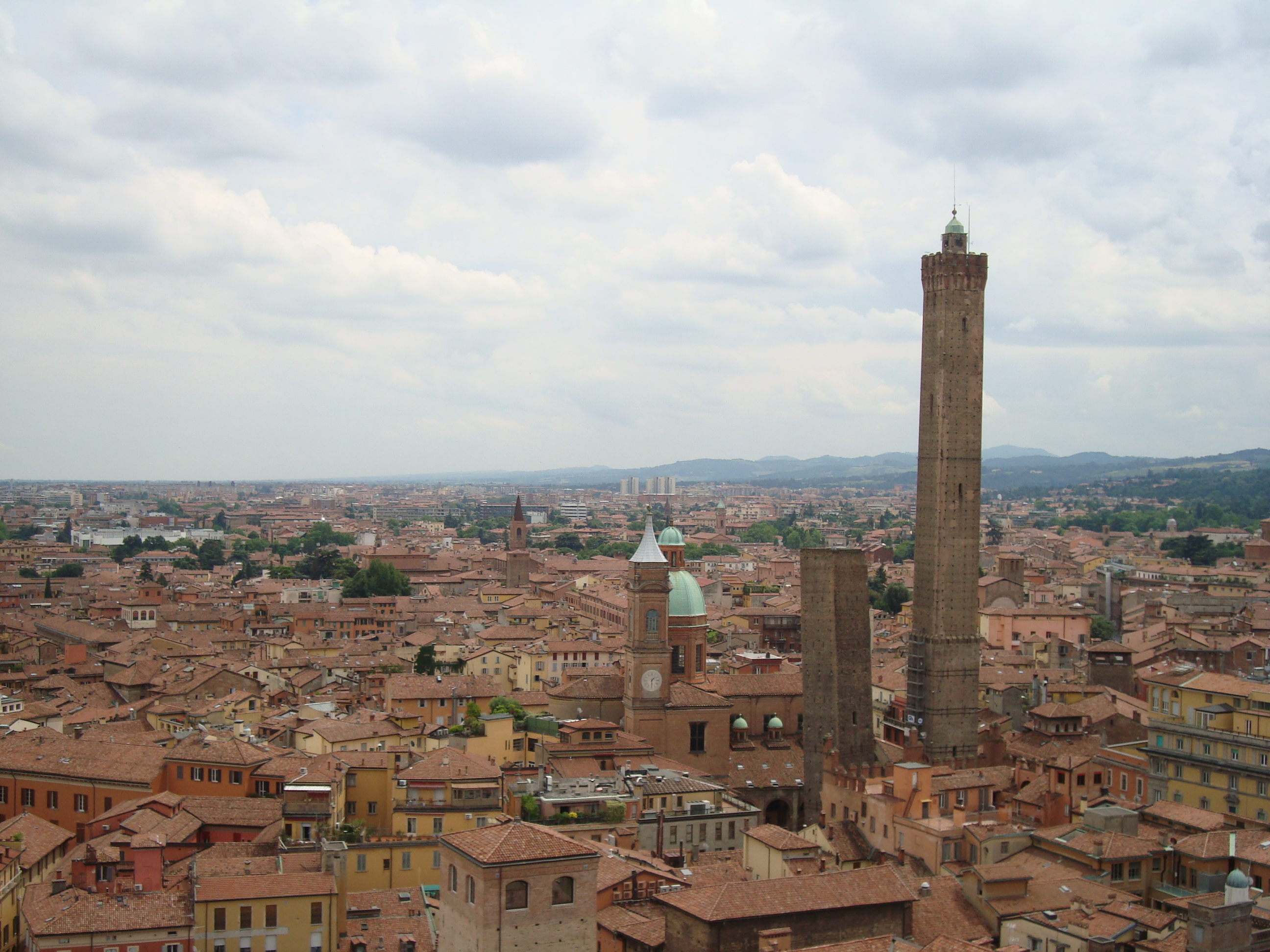 “Scorci di Bologna” This is a photo of a monument which is part of cultural heritage of Italy.